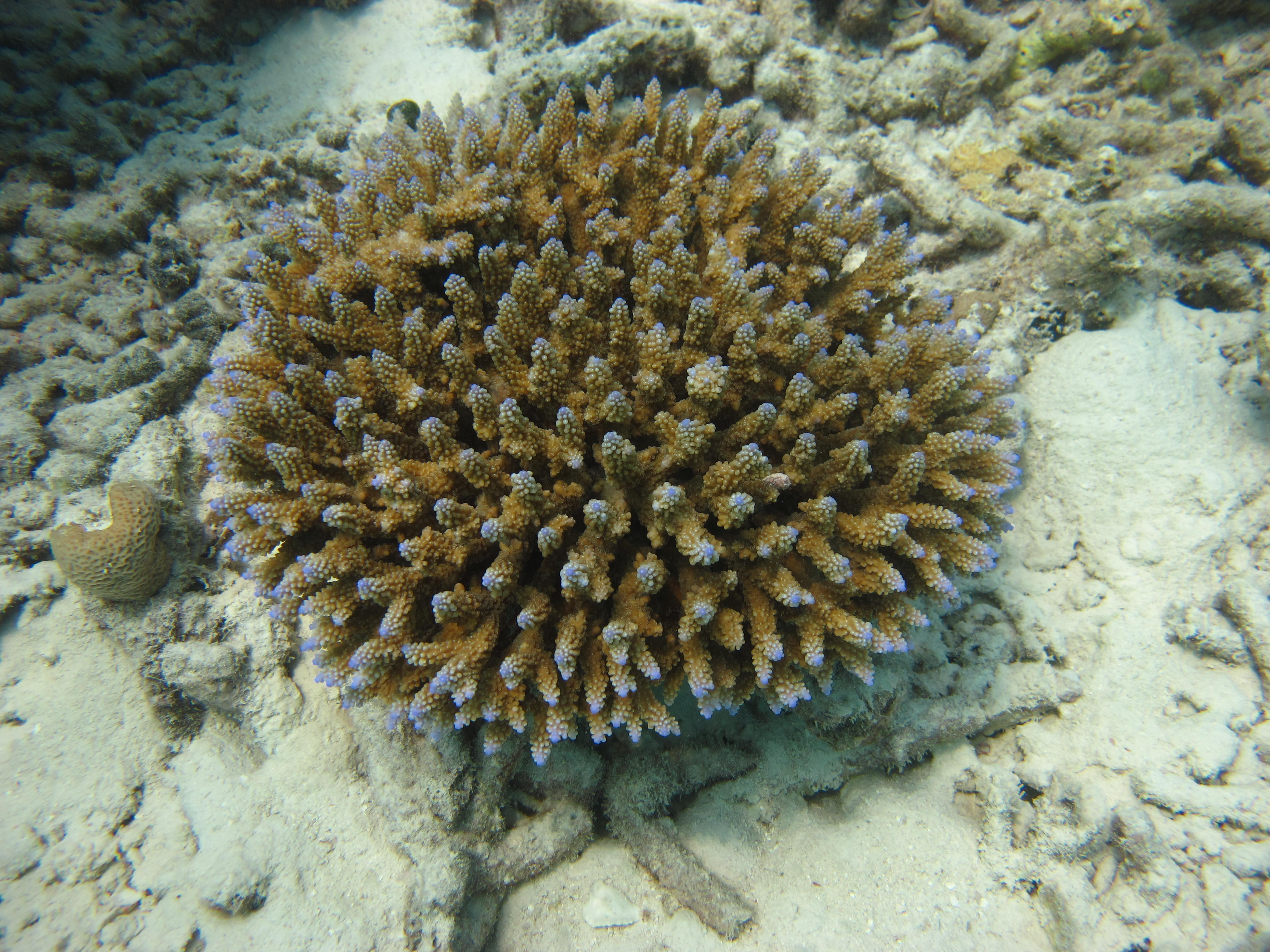 Une colonie de corail Acropora latistella aux Maldives (atoll de Baa).